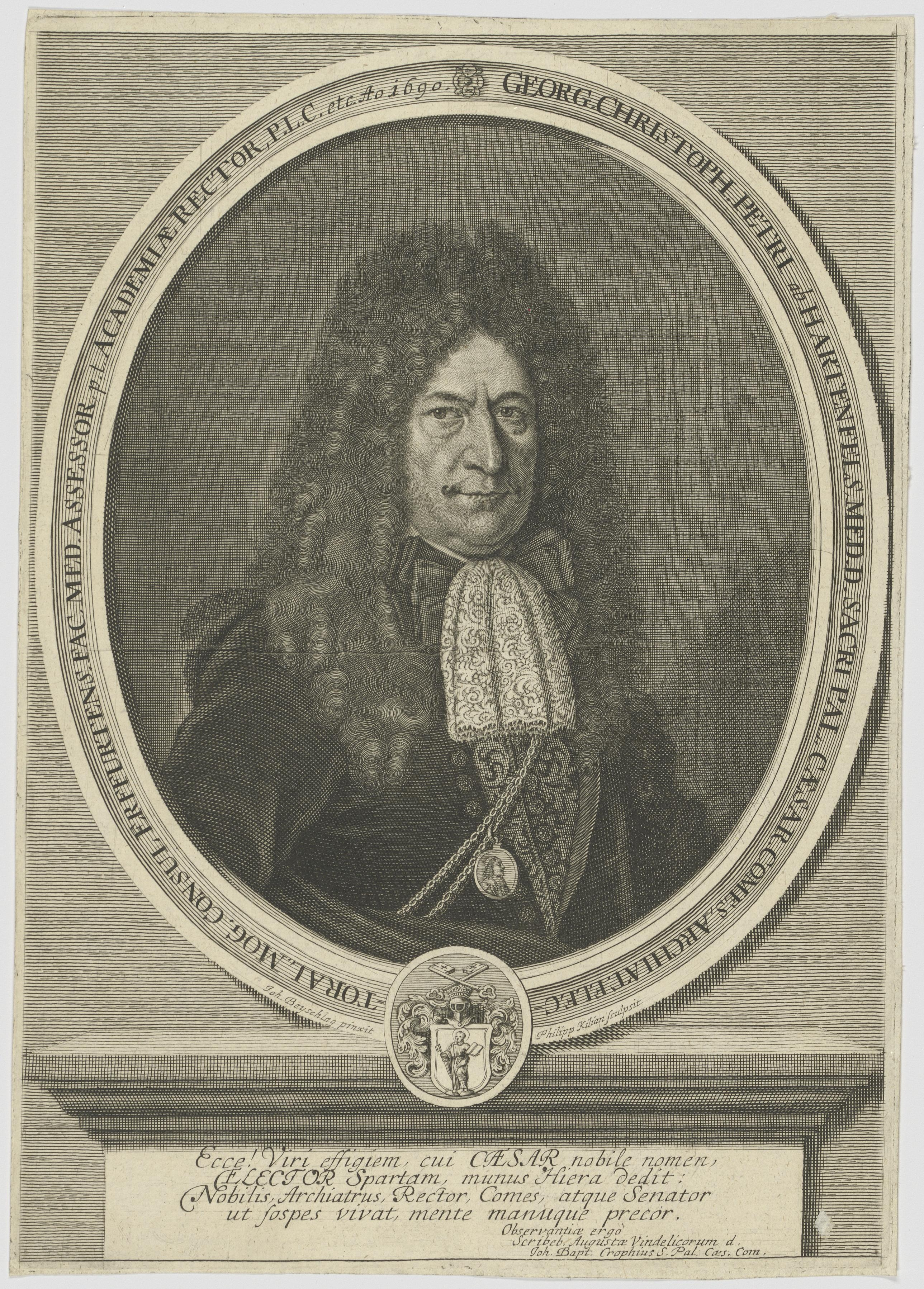 Bildnis des Georg Christoph Petri ab Hartenfels